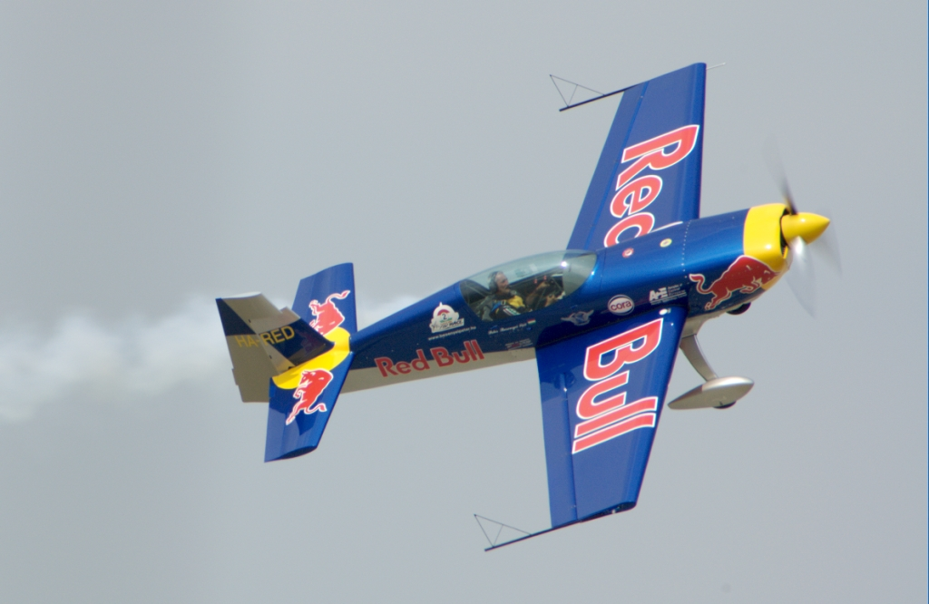 Besenyei Péter és az Extra 300 (Kecskemét, repülőnap)